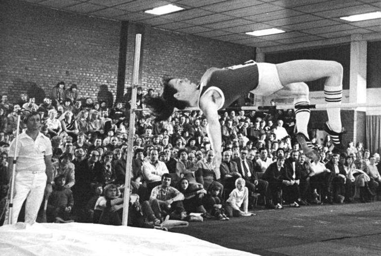 Andrea Bienias-Reichstein ADN-ZB Ludwig-16.1.82 Bez. Erfurt: Hochsprung mit Musik. Bei den sechsten Arnstädter Hochsprungwettbewerben zum Jahresauftakt gewann die Vorjahressiegerin Andrea Bienias-Reichstein aus Leipzig mit der Höhe von 1.90 m. siehe auch 1982-0116-24,25 u. 27N